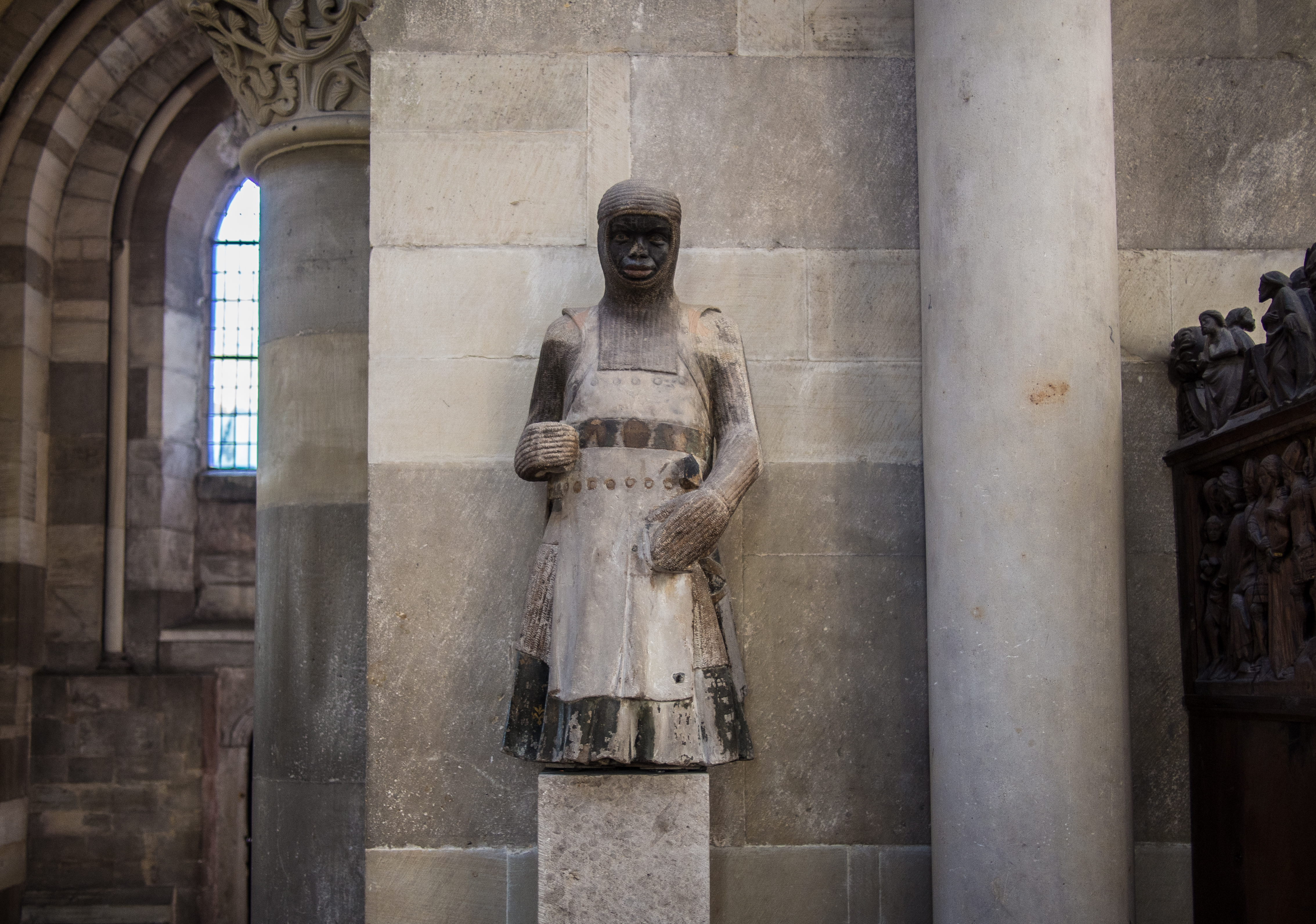 St. Maurice